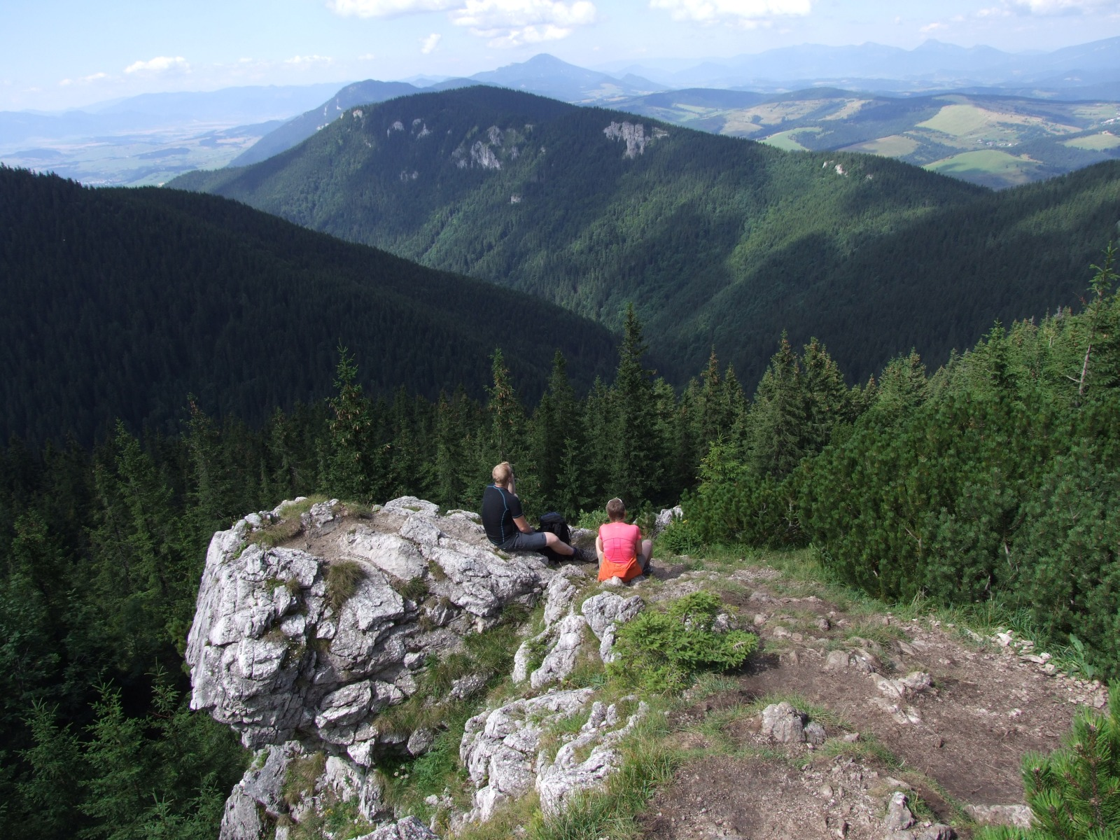 Biała Skała i widok na Orawę